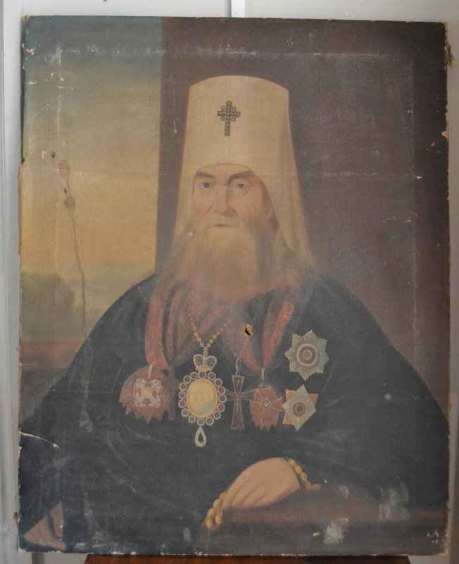 Портрет Ионы (Василевского), митрополита Карталинского и Кахетинского, экзарха Грузинского Экзархата РПЦ.